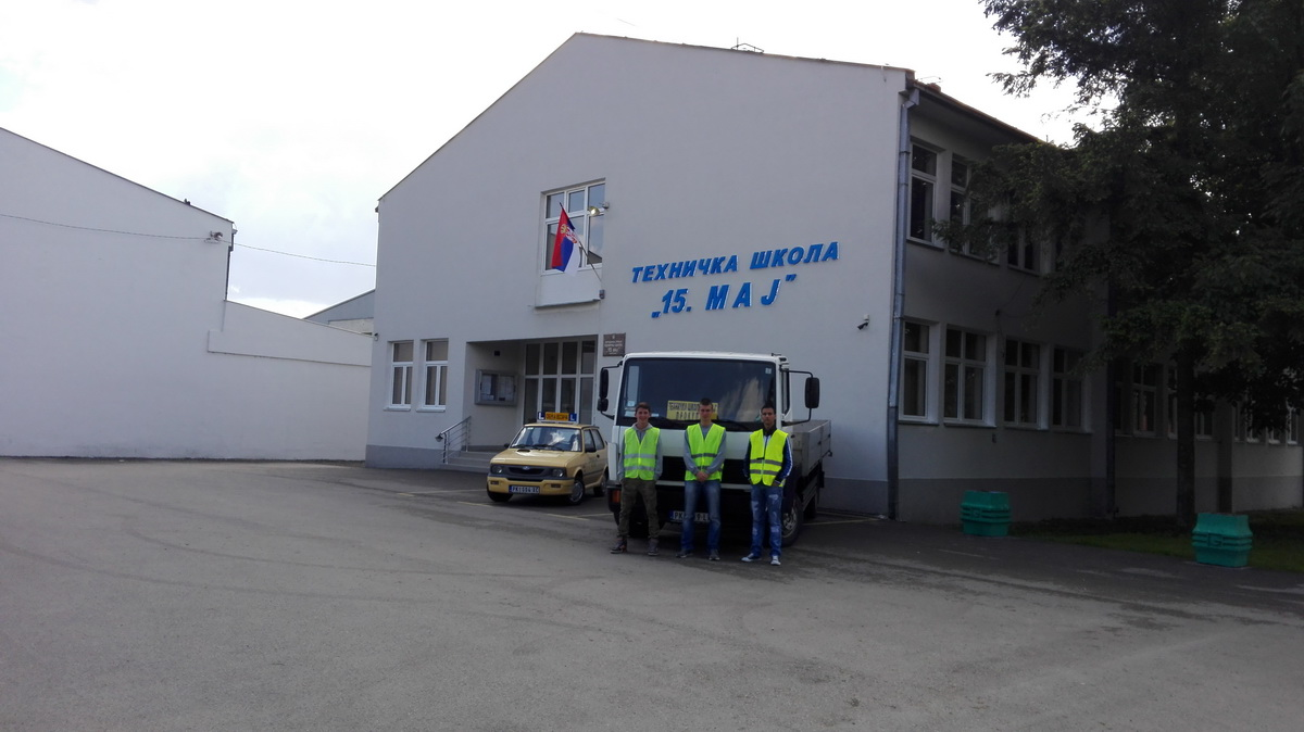 Изглед школе